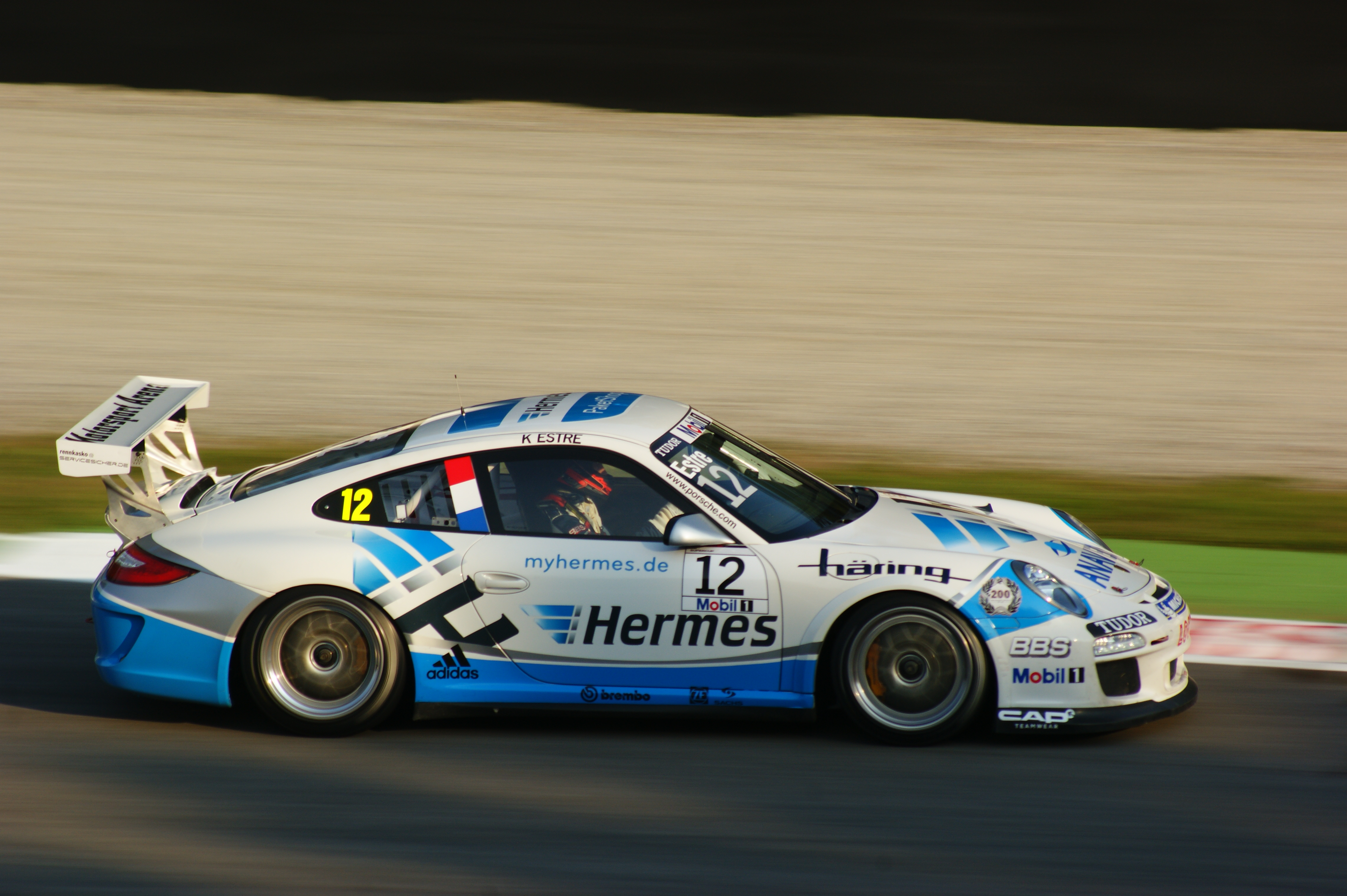 Kévin Estre alla variante Ascari Monza 2011